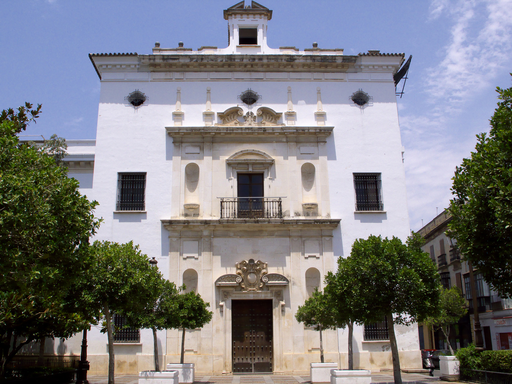 Antigua Iglesia de San Hermenegildo, Sevilla. Fue iglesia, cuartel, Sede de las Cortes de Cádiz, sede del Parlamento de Andalucía, teatro, etc. Portada manierista de Alonso de Vandelvira y Herrera el Viejo.